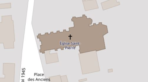 plan au sol de l'église Saint-Pierre à Parçay-sur-Vienne.